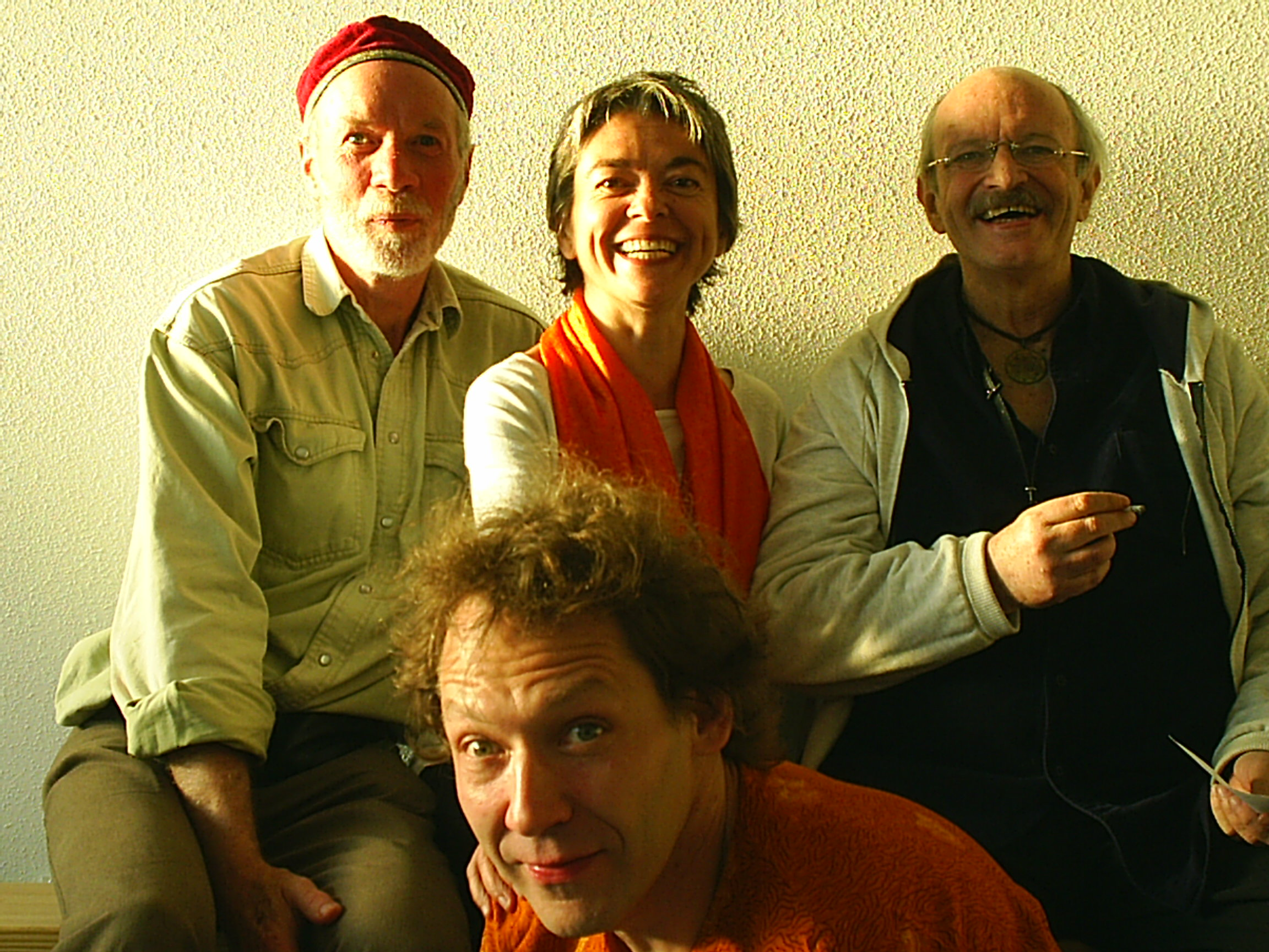 self portrait pontarlier 2005